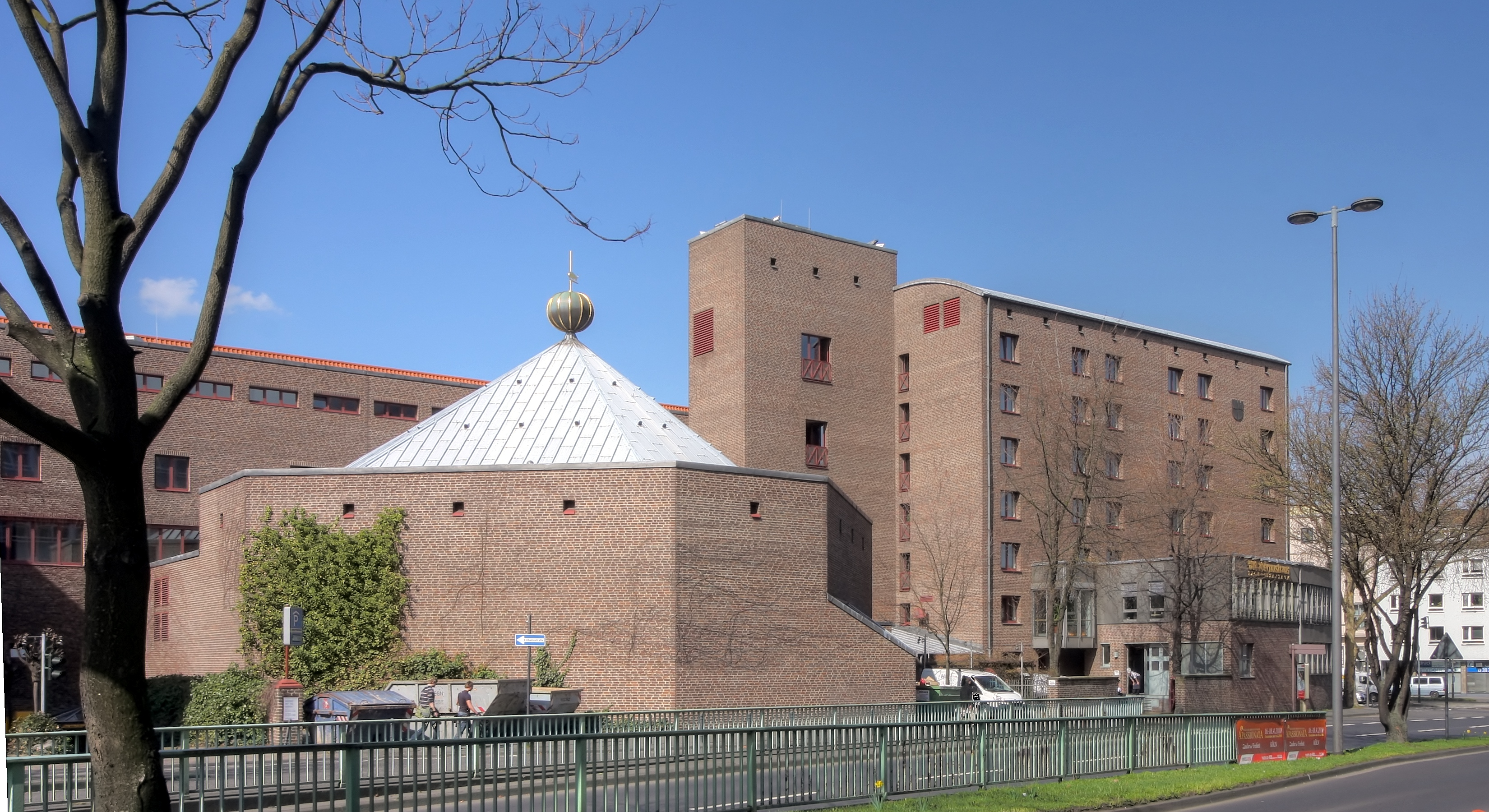 Maternushaus, Tagungszentrum des Erzbistums Köln, Rückansicht von der Nord-Süd-Fahrt. Links der Maternus-Saal. Architekt: Hans Schilling. Baujahr: 1978-83